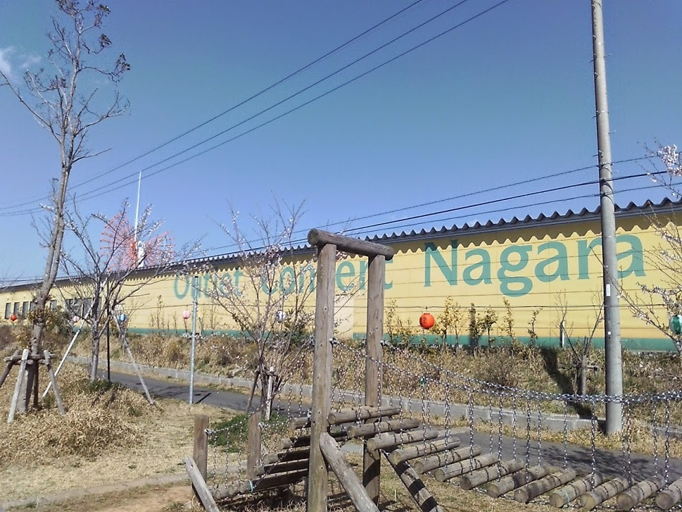 アウトレットコンサート長柄